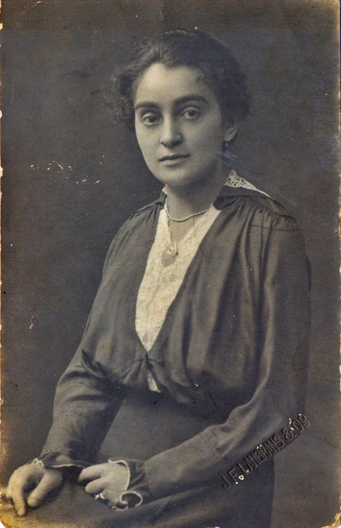 Maminka Věry a Hanky Kohnových Melanie – jedná z rodiny, jejíž podobu známe.